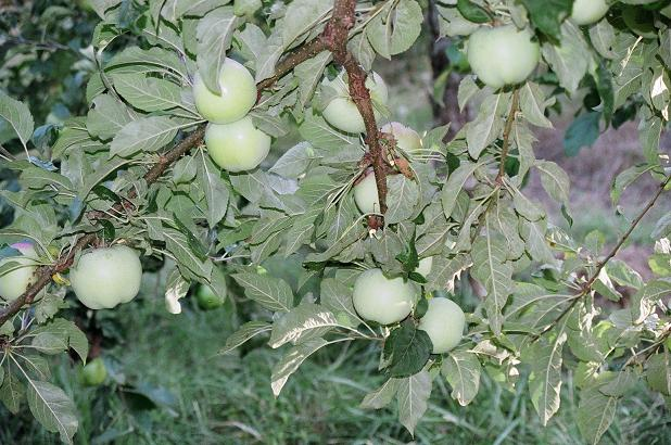 verdaj pomoj pendantaj de arbobranĉoj